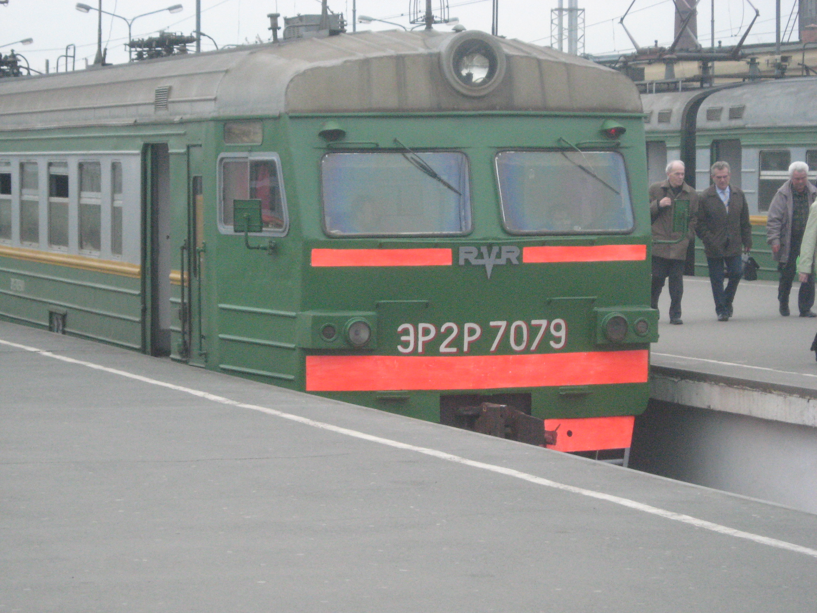 ЭР2Р-7079 на Балтийском вокзале